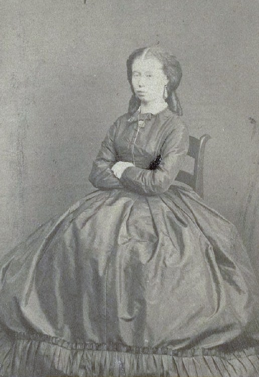 Екатерина Павловна Замятнина